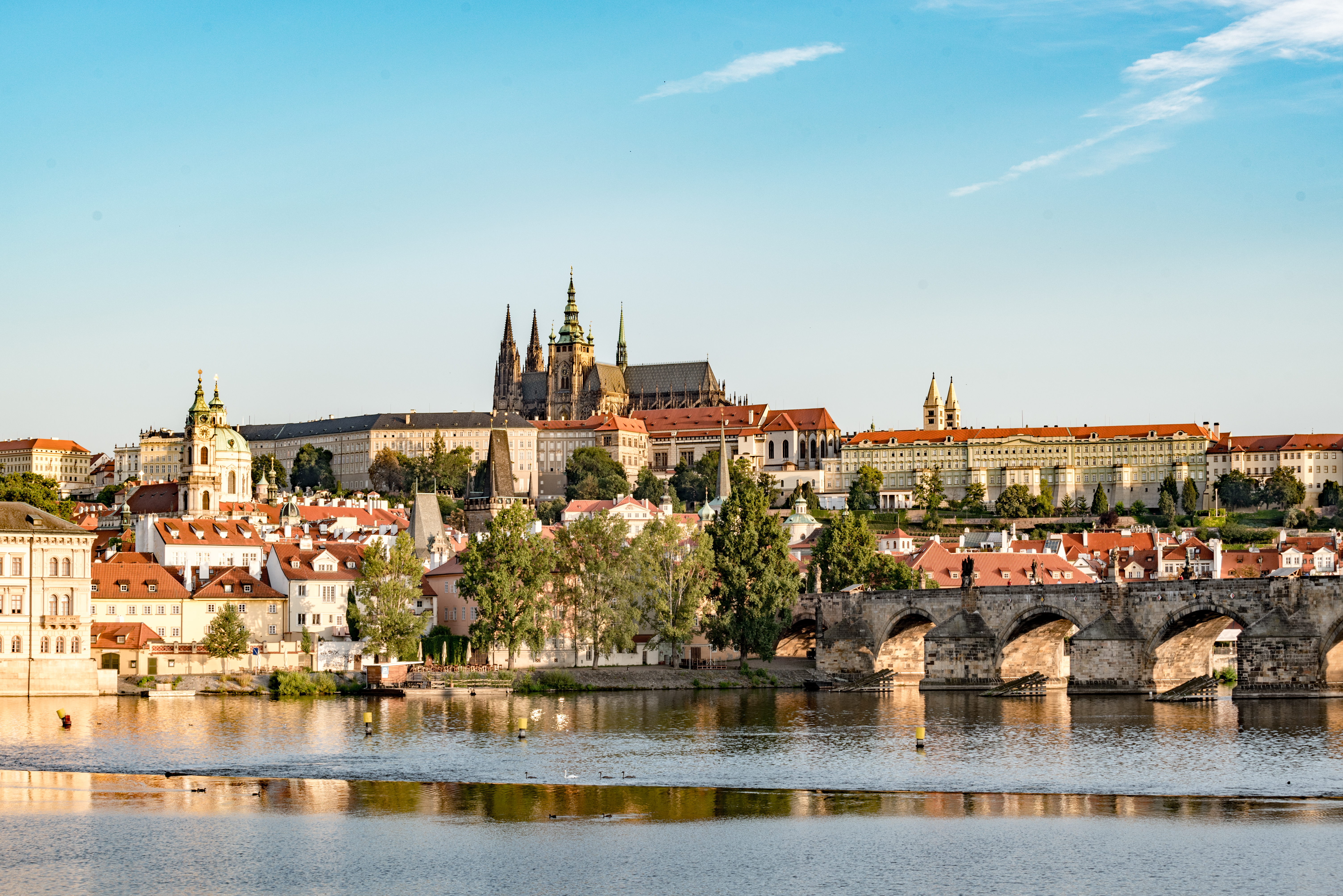 Praha, Staré Město, Karlův most